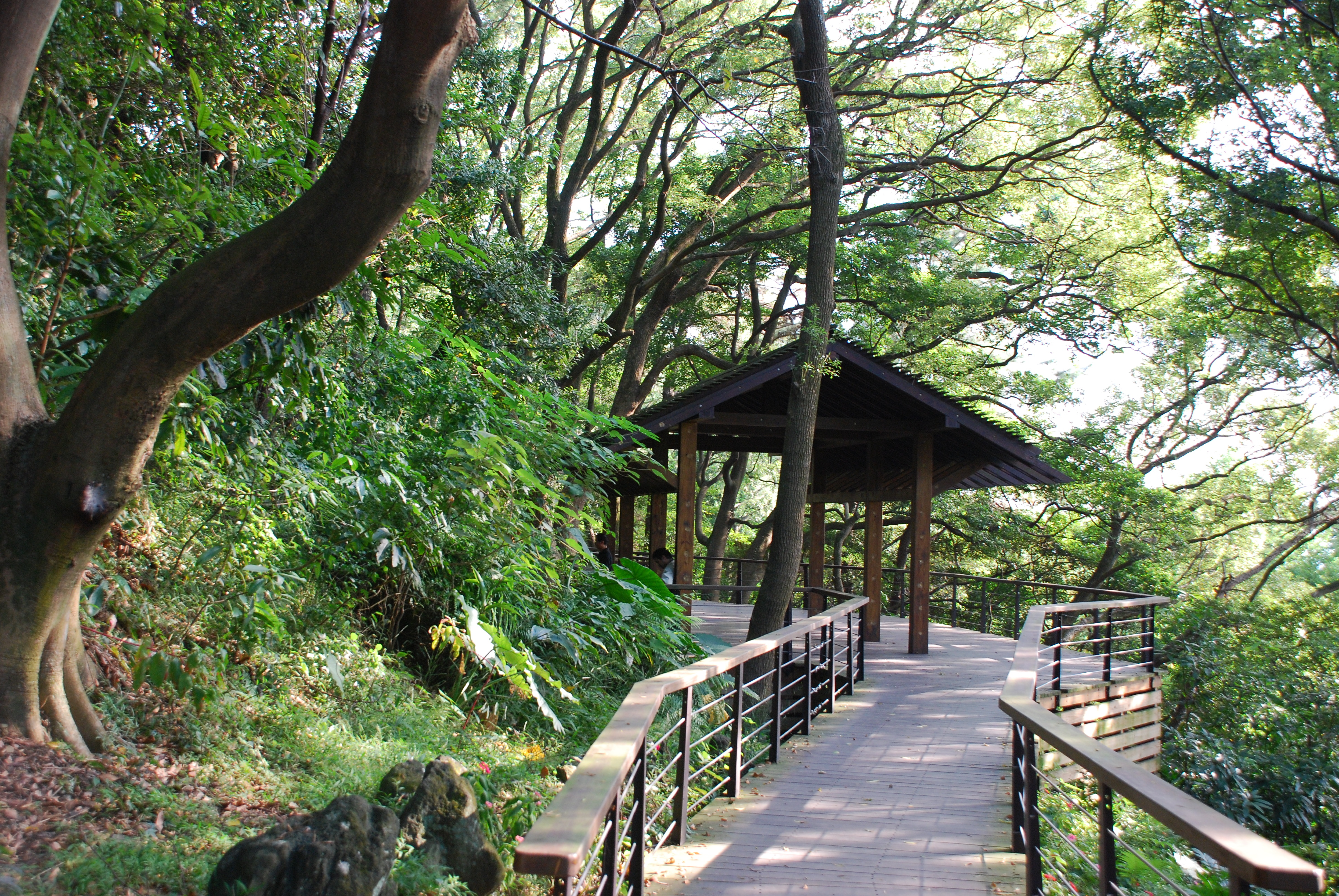 333, Taiwan, 桃園市龜山區龜山里